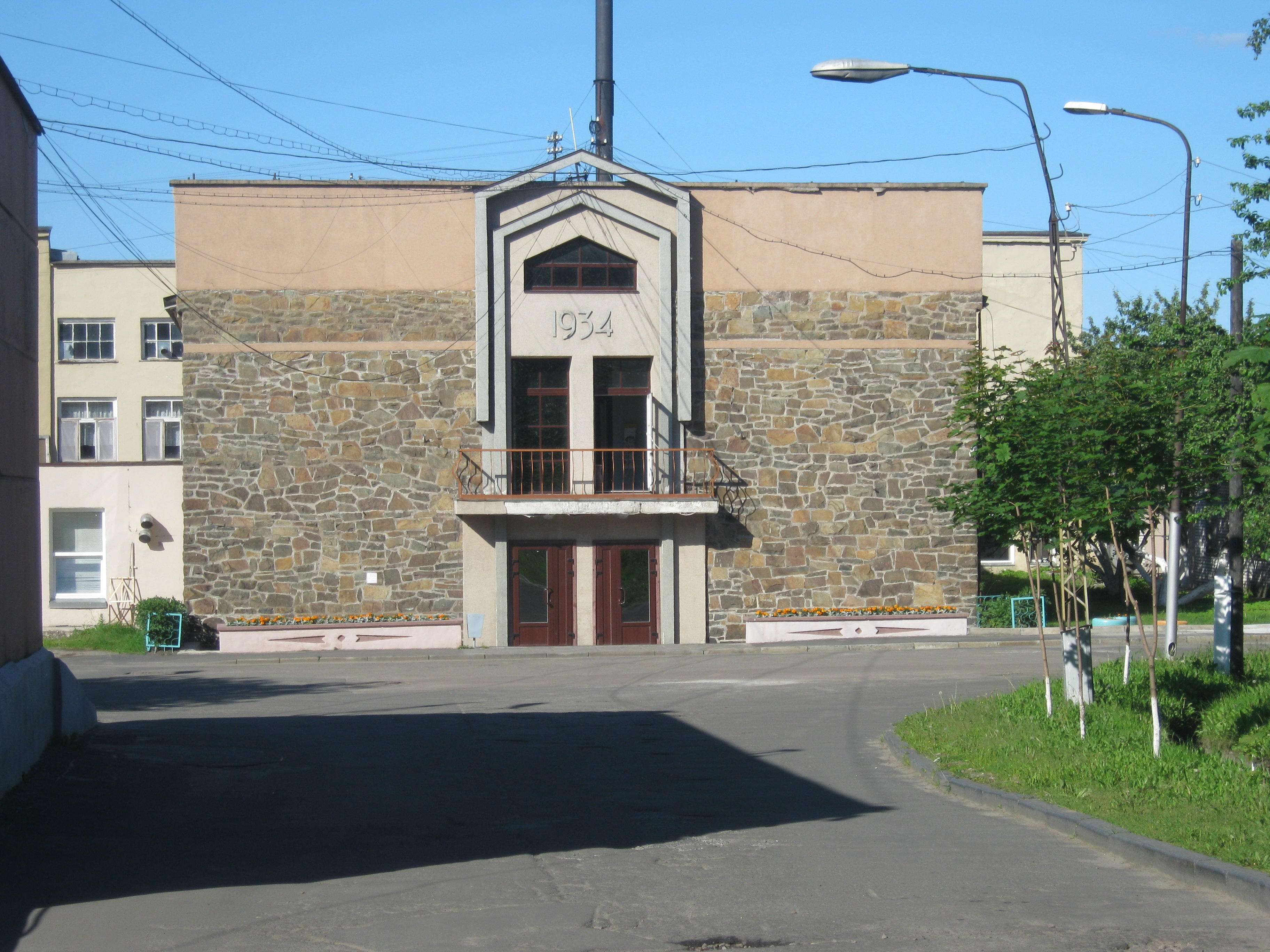 Промышленность Петрозаводска